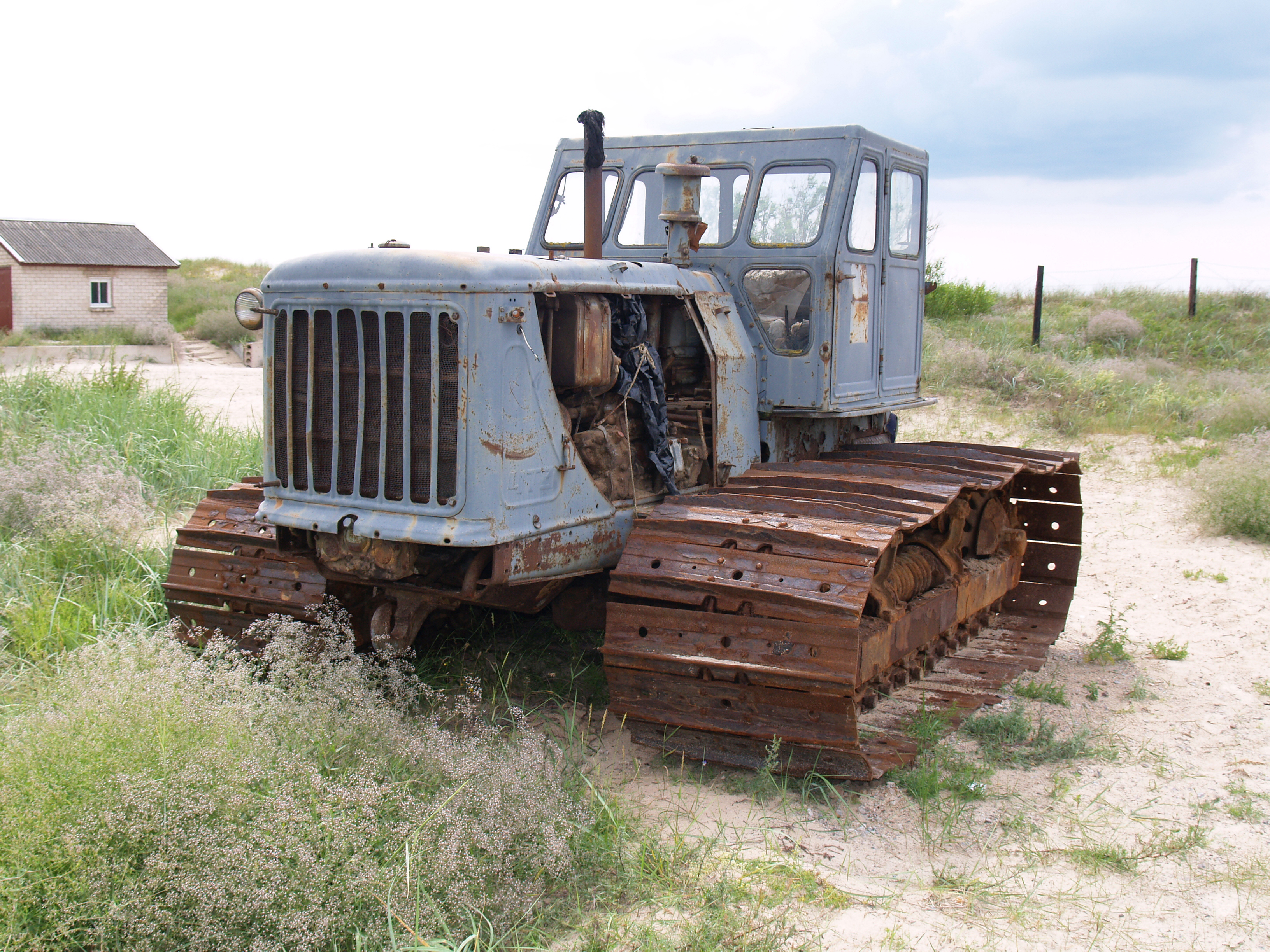 Pagājušā gadsimta dzelzs spēkavīrs (Last centurie's iron athlete)